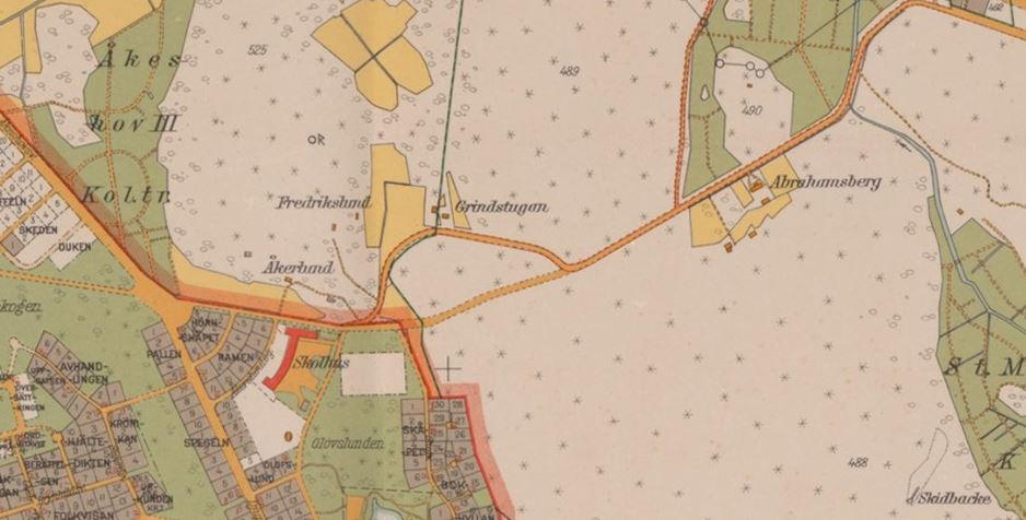 Utsnitt kring Åkeslund på 1934 års karta med torpen Fredrikslund, Åkerslund och Abrahamsberg och Olovslundsskolan